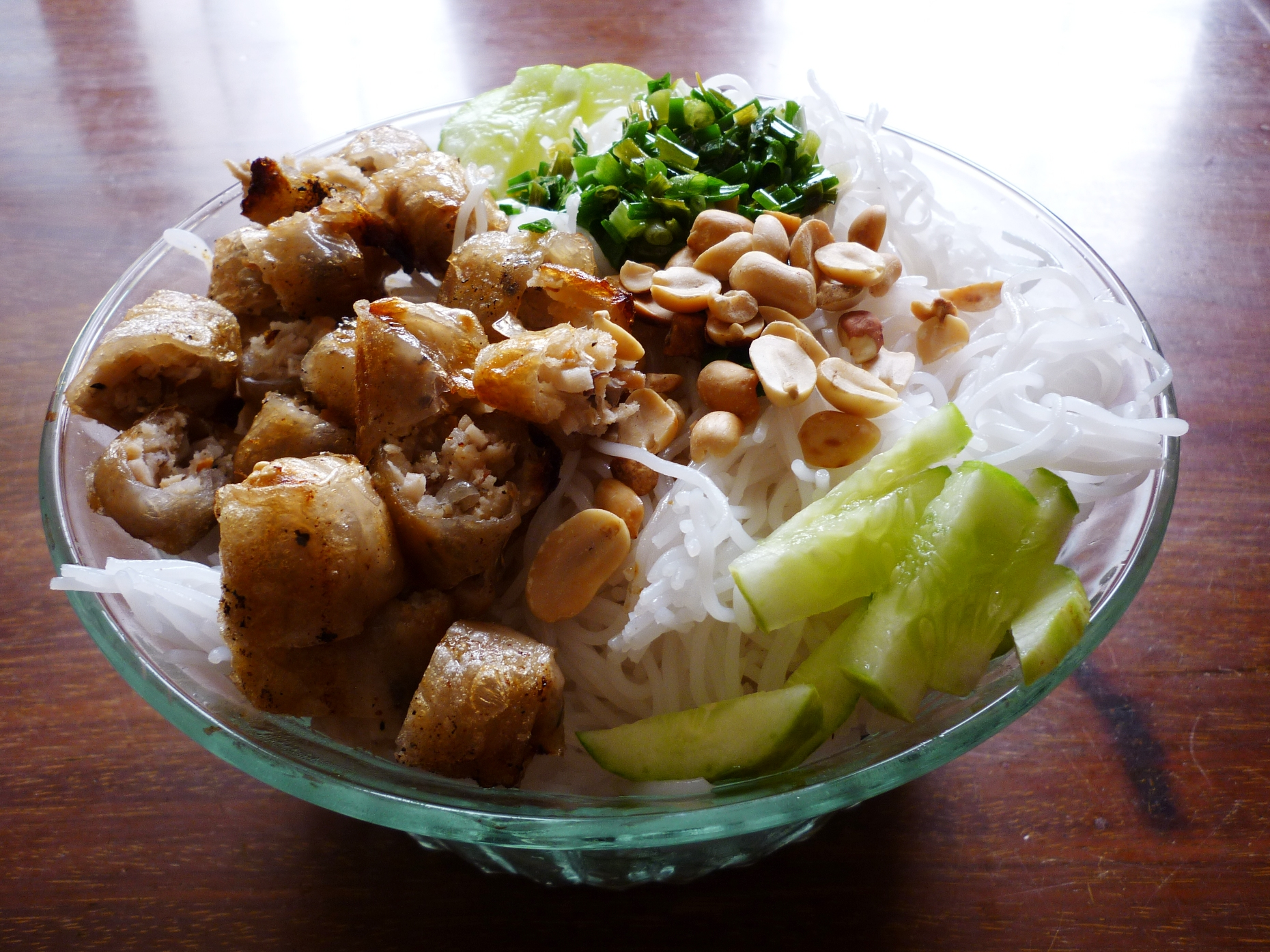 Bún chả giò ăn kèm với dưa leo xắt nhỏ, giá, đậu phông rang, hành và đặc biệt là nước mắm ớt pha tí chanh với một ít đường.